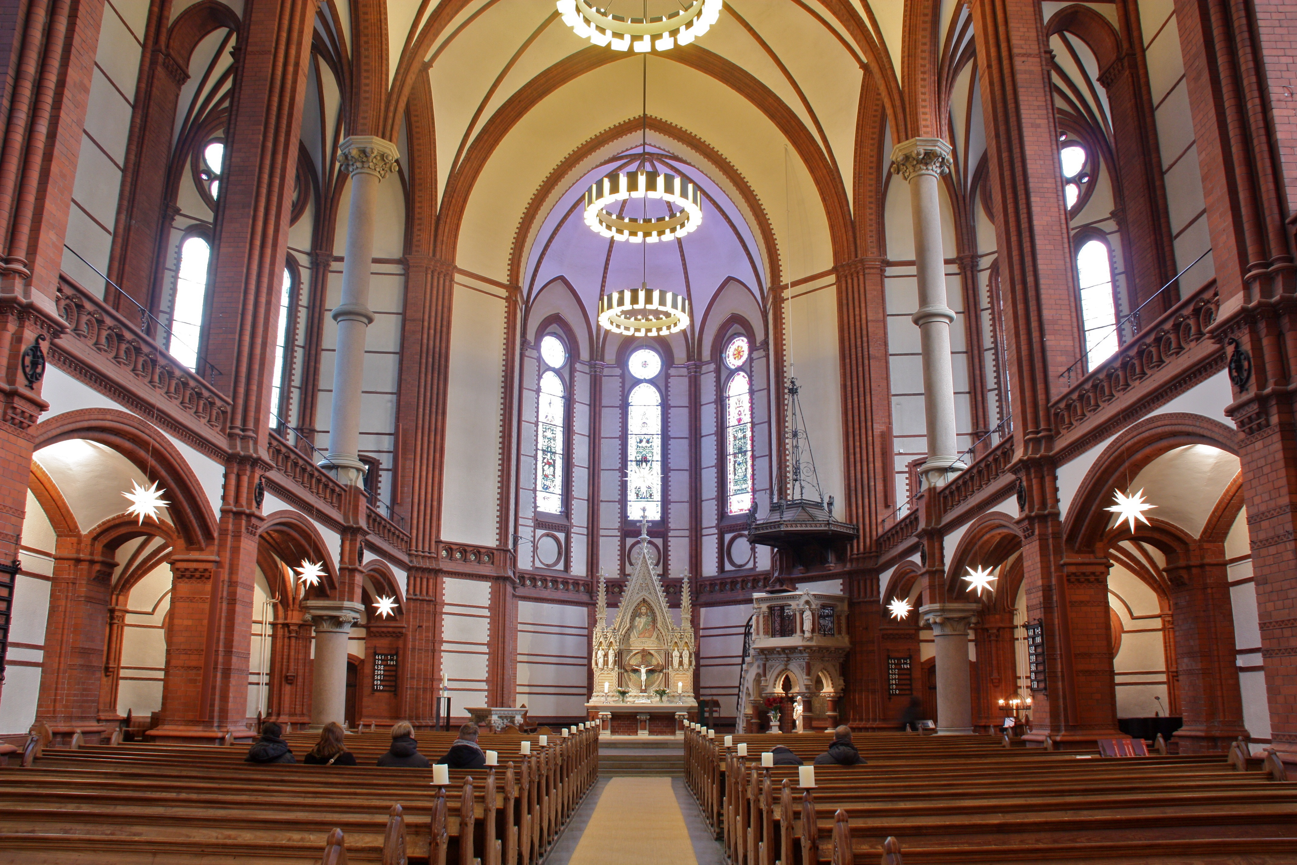 Hamburg, Uhlenhorst, Kirche St. Gertrud, Innenraum